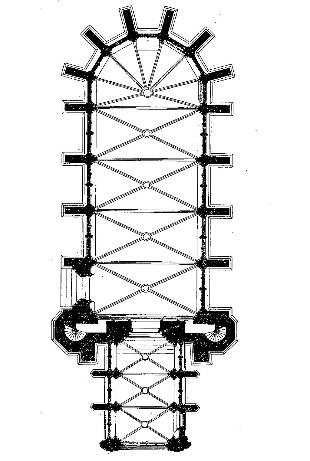 Plan de la sainte-Chapelle.